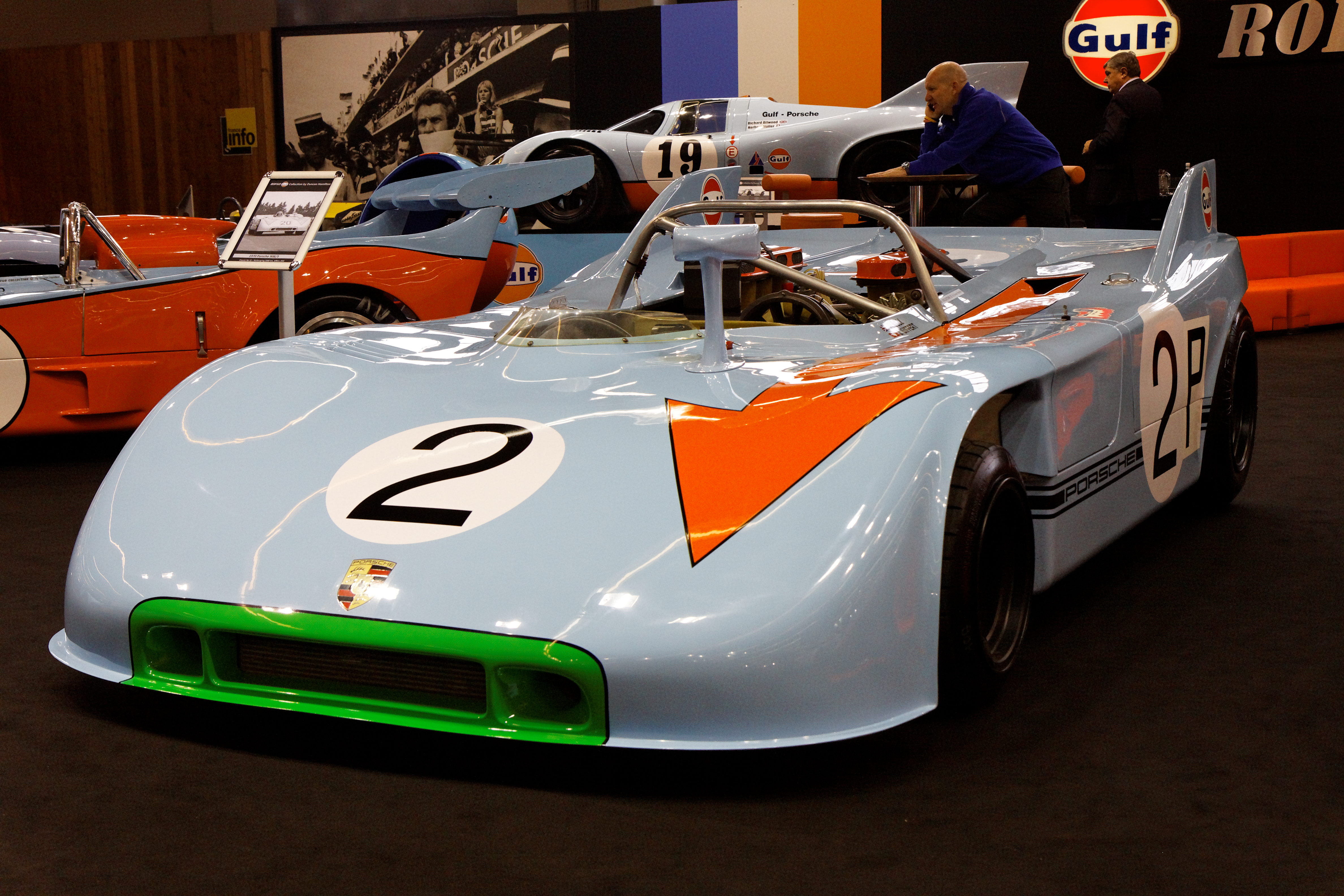 Porsche spider 908/3 (ex-Siffert/Bell) Photographie prise lors du salon rétromobile 2011 à Paris, porte de Versailles.